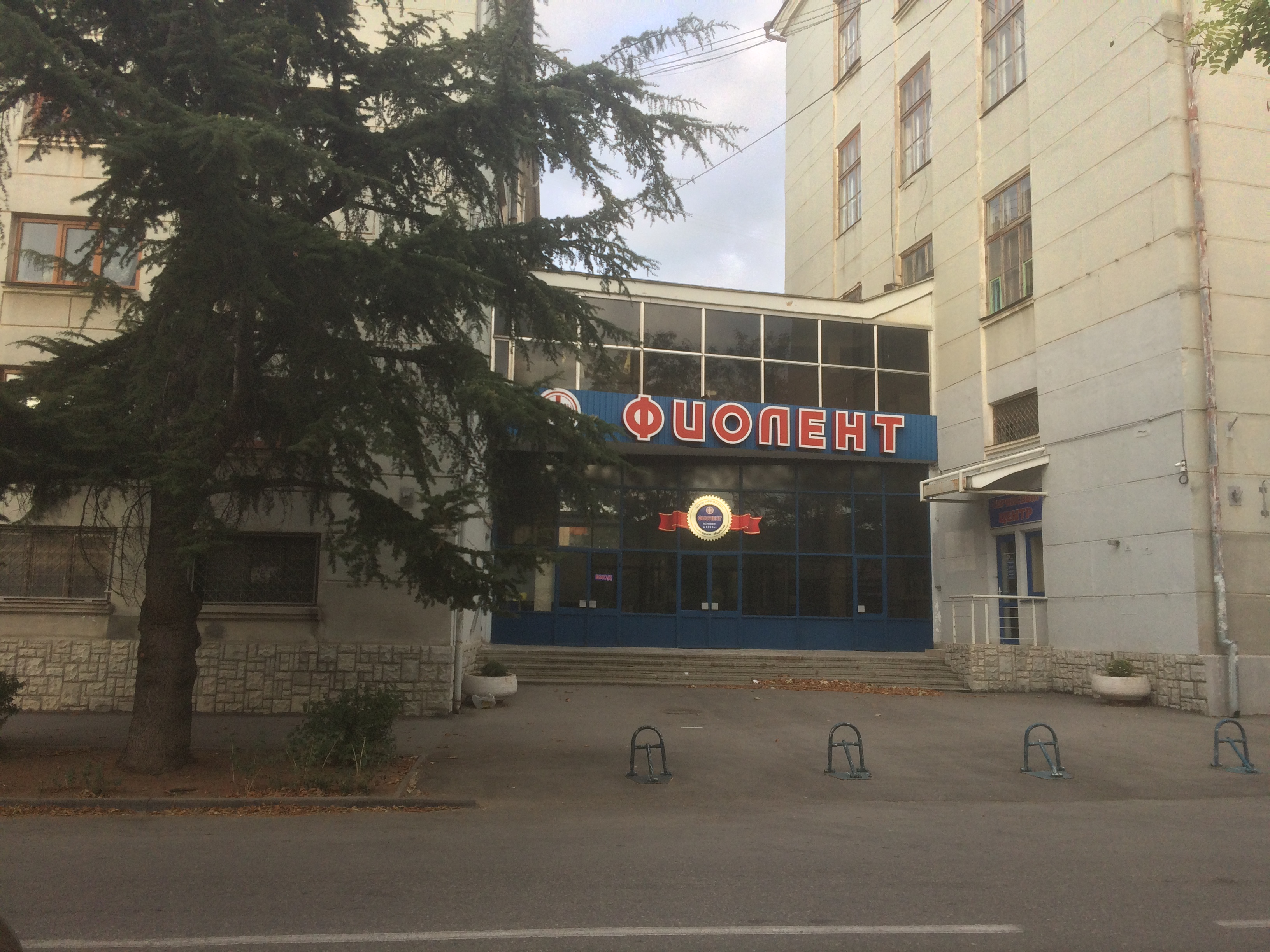 Завод Фиолент